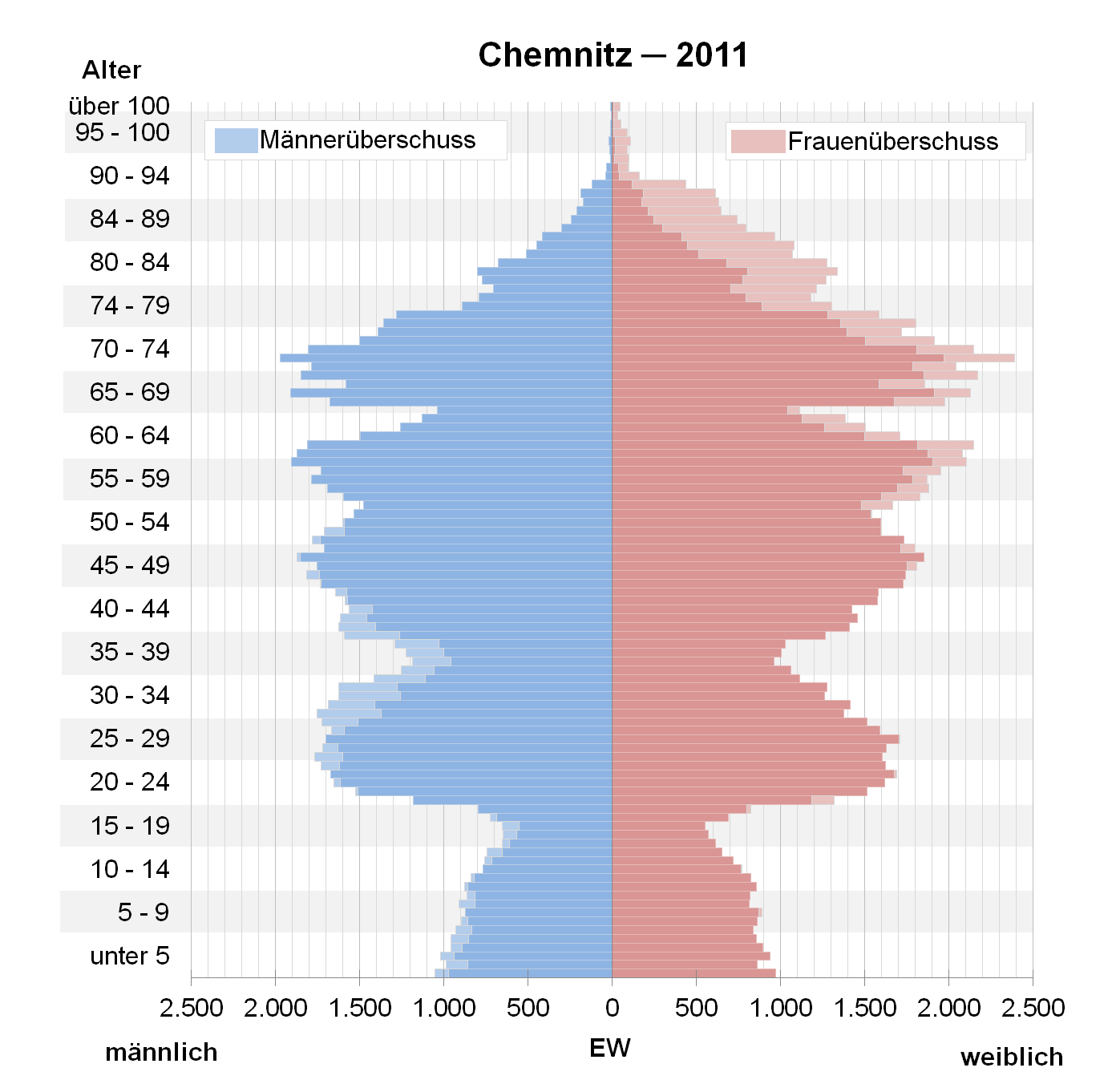 Bevölkerungspyramide der Stadt Chemnitz nach Zensus 2011.